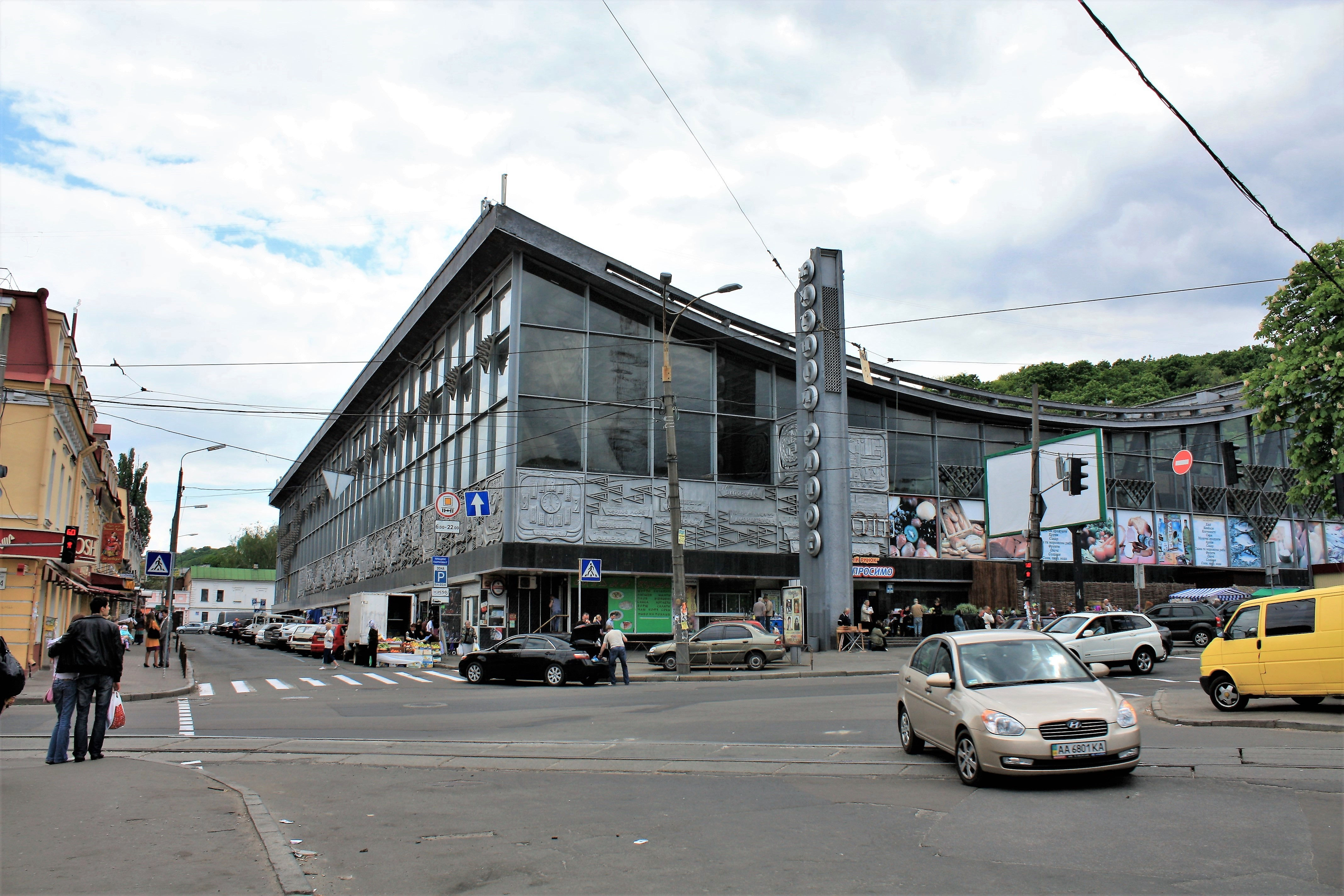 Київ, Житньоторзька вулиця та Житній ринок